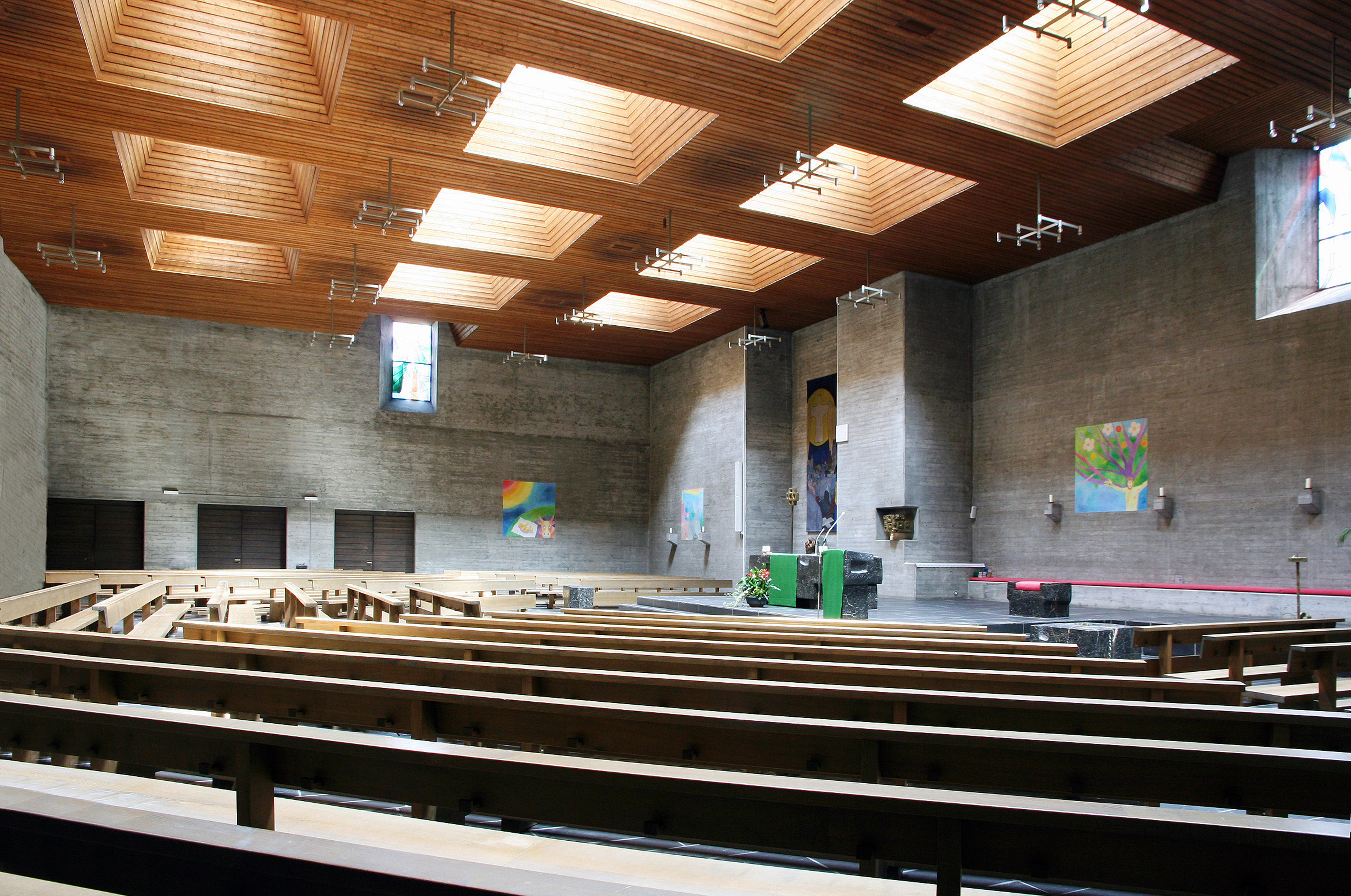 Römisch-katholische Pfarrkirche Christ König Biel/Bienne